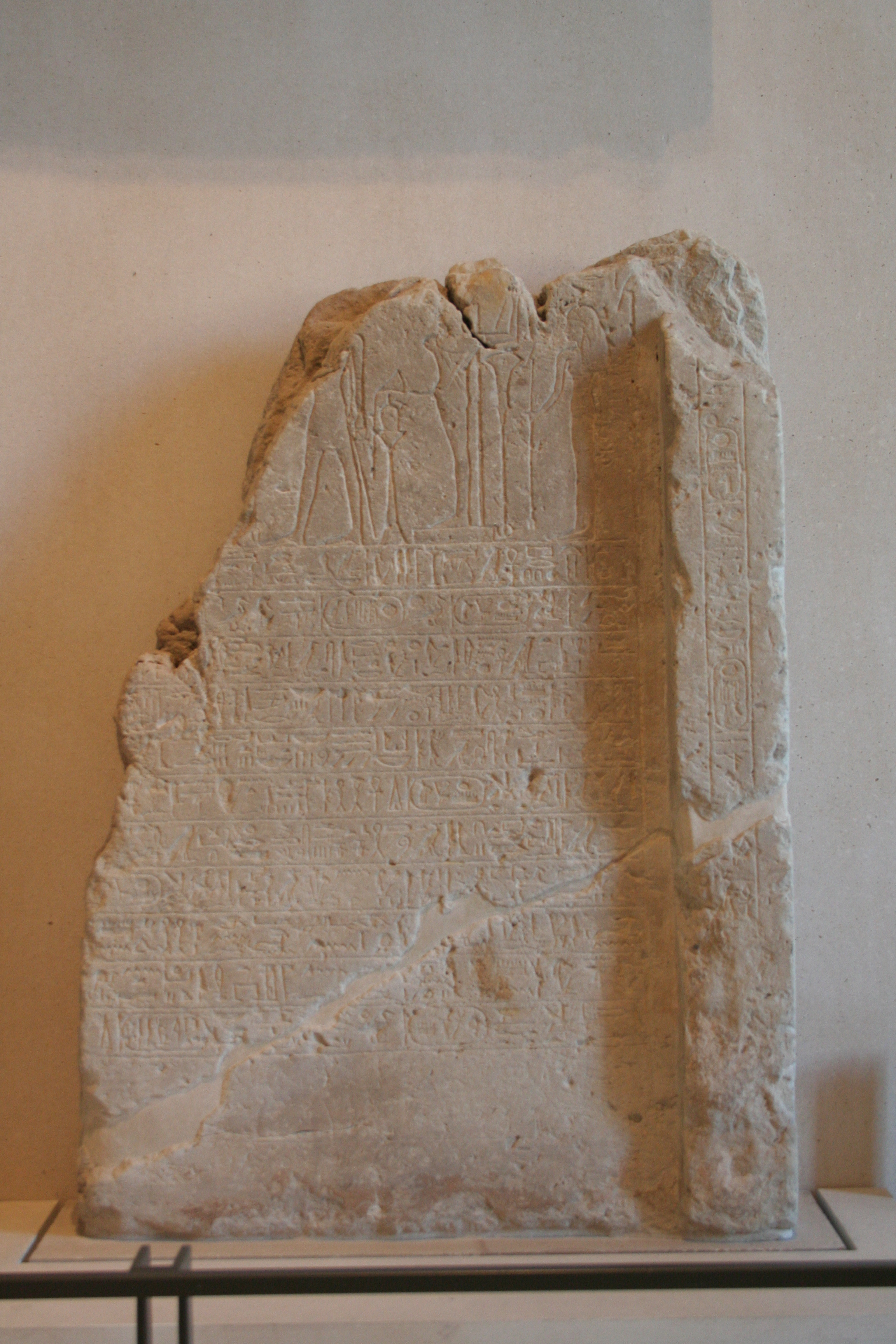 Fragments de listes d'offrandes, règnes de Ramsès Ier et de Séthi Ier (1295 à 1279 avant J.-C.), 19e dynastie